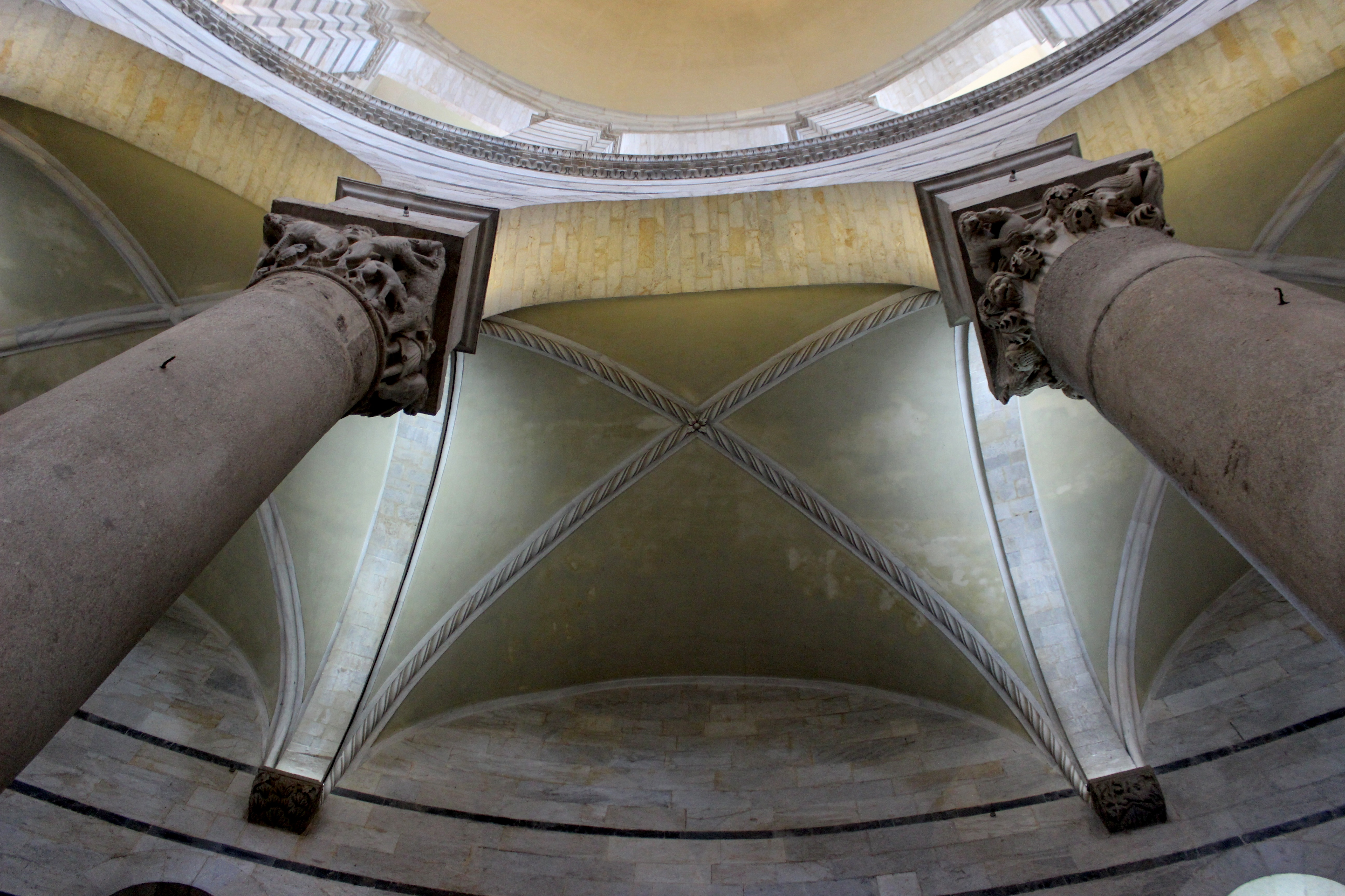 Pisa, Baptisterio. Interior.